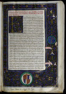 Códice manuscrito